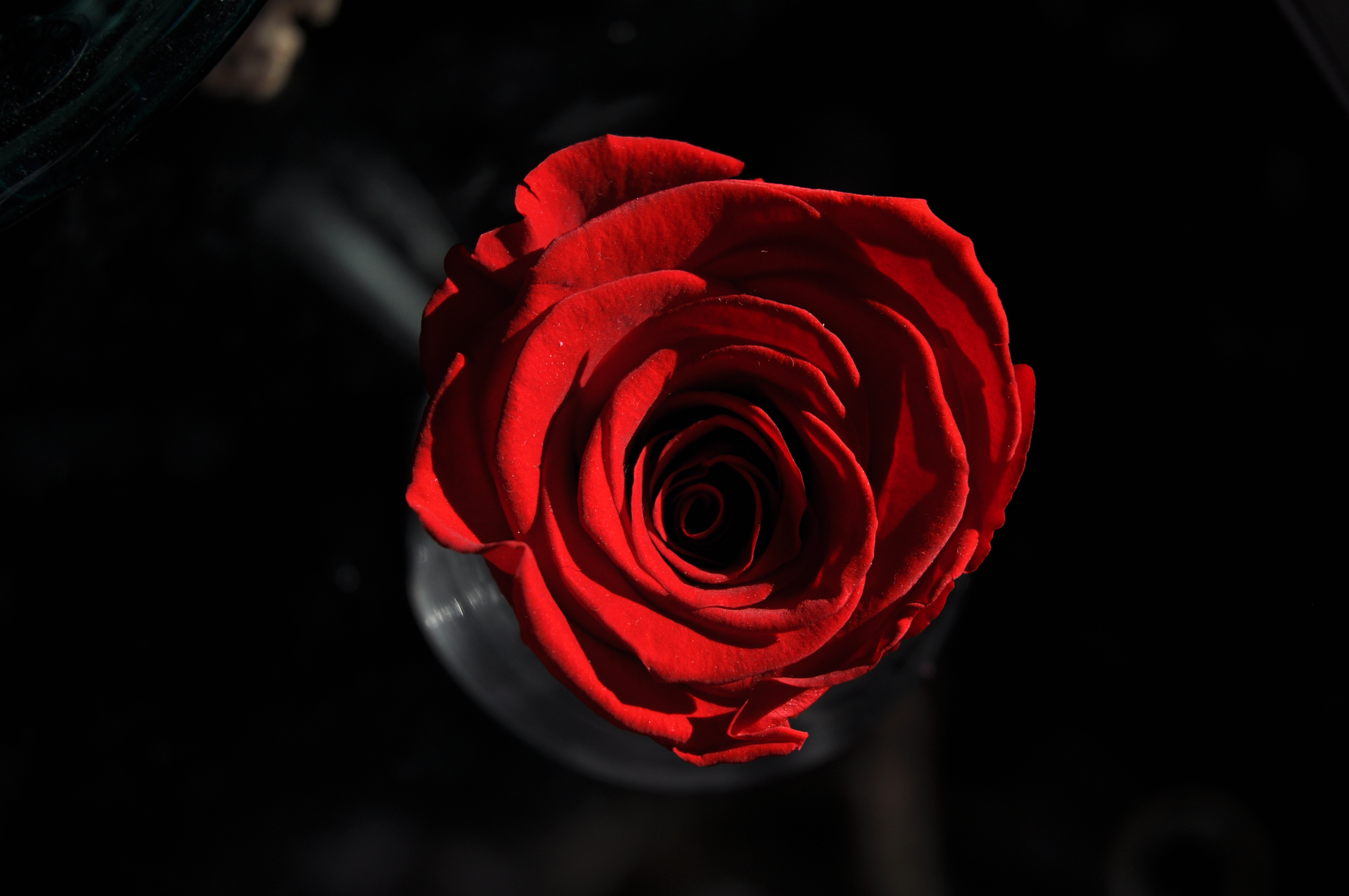 Scarlet rose.